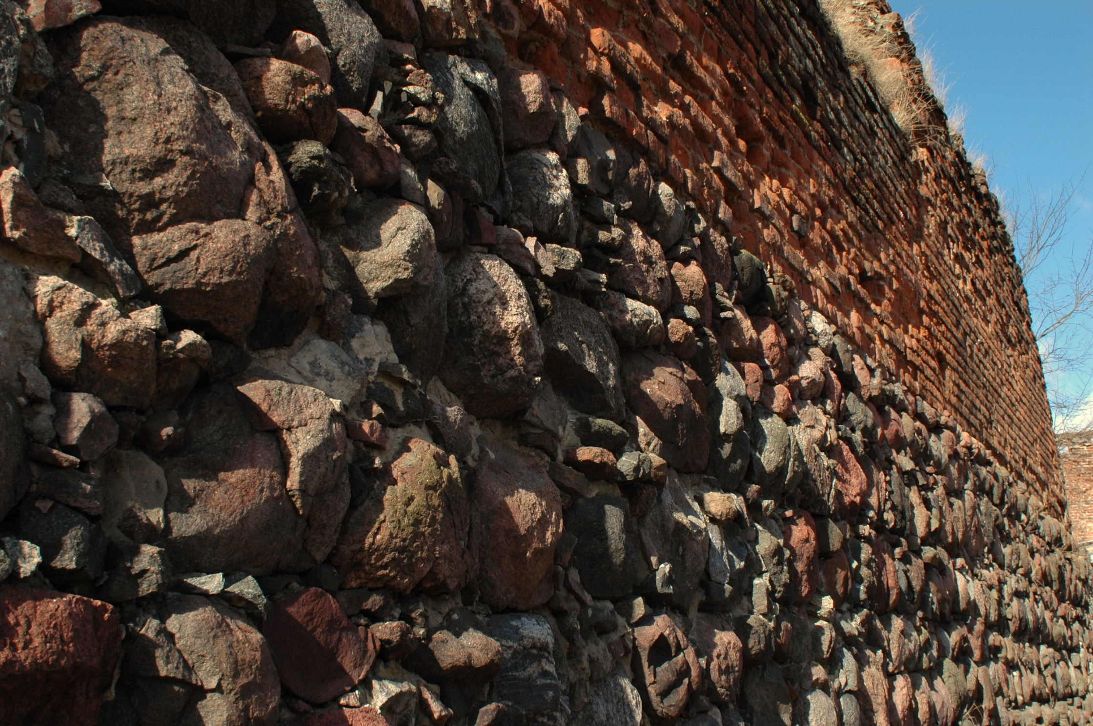 zespół murów miejskich w Debrznie, pow. człuchowski